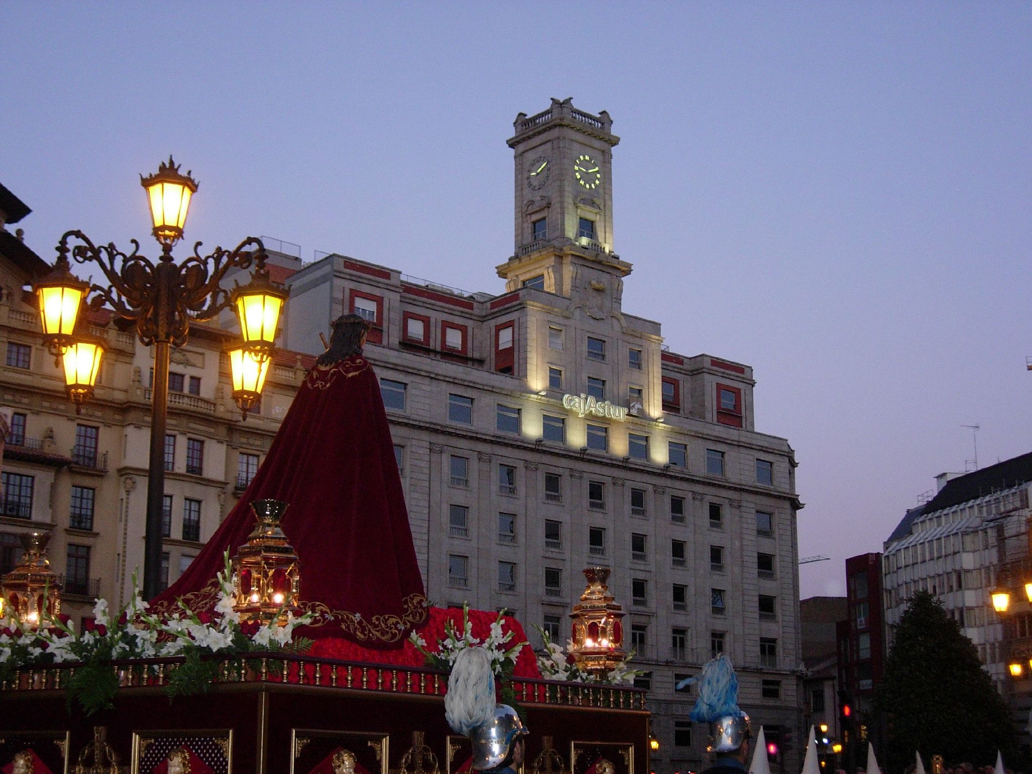 El paso de Jesús Cautivo.